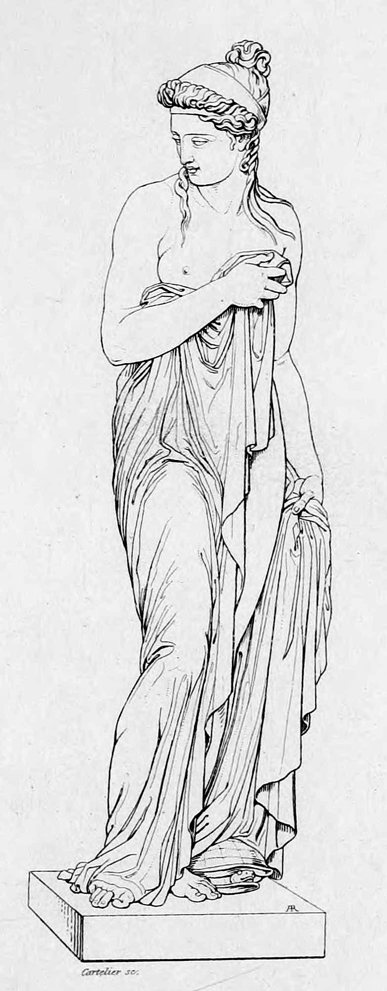 La Pudeur. A ses pieds, une tortue.